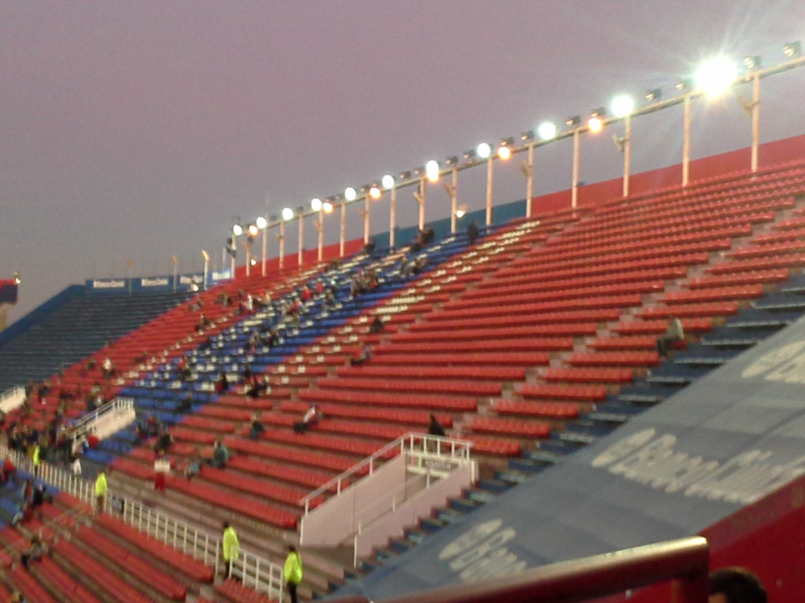 Platea Sur Nuevo Gasometro (San Lorenzo de Almagro)